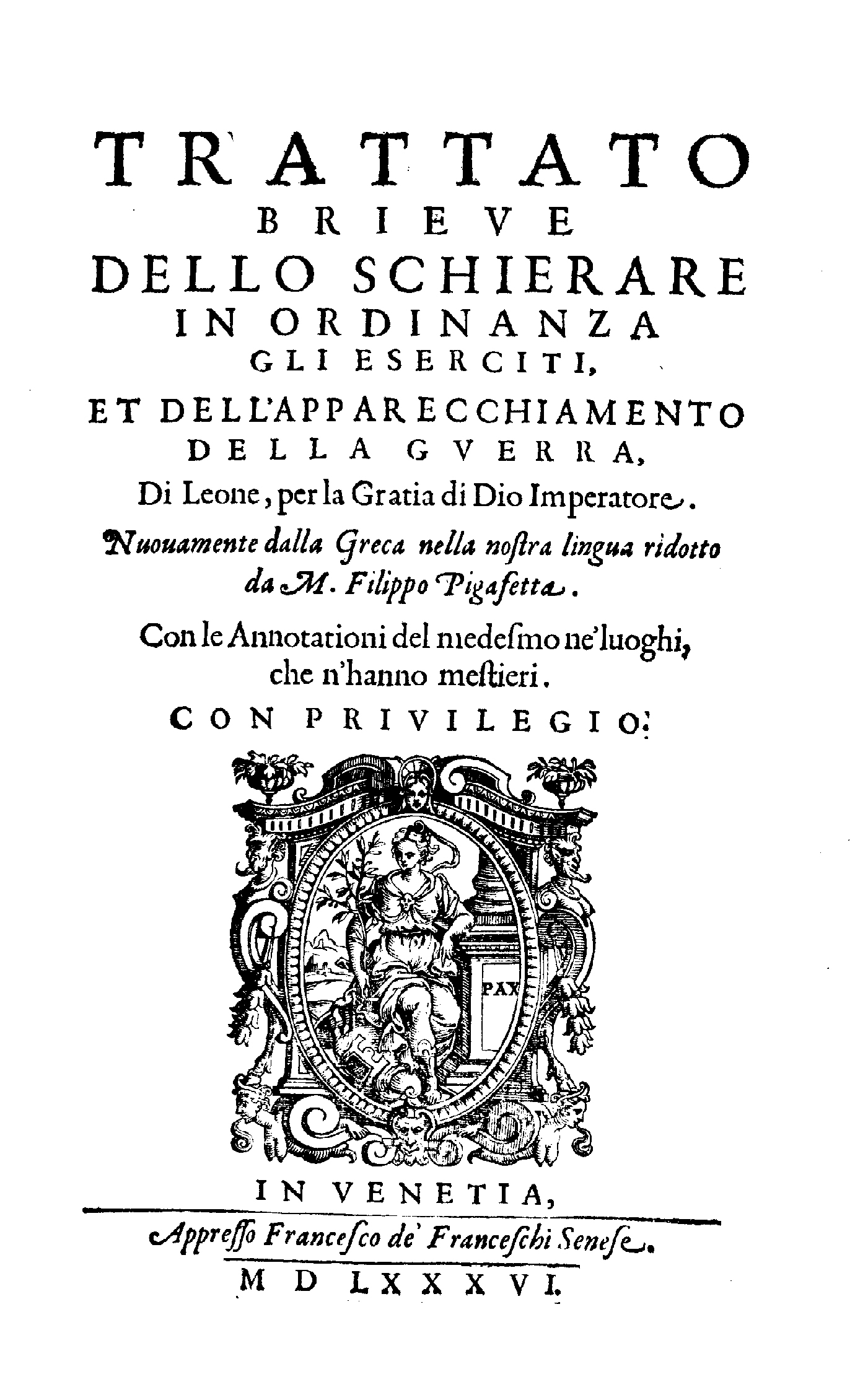 Trattato brieue dello schierare in ordinanza gli eserciti, et dell'apparecchiamento della guerra, di Leone, per la gratia di Dio imperatore. Nuouamente dalla greca nella nostra lingua ridotto da m. Filippo Pigafetta. Con le annotationi del medesmo ne'luoghi, che n'hanno mestieri. - In Venetia : appresso Francesco de' Franceschi senese, 1586. - [40], 344 [i.e. 346], [2] p. ; 4º .